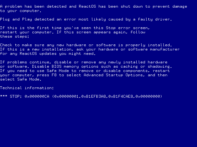 ReactOS 0.4.0 BSOD. Screenshot made on a virtual machine